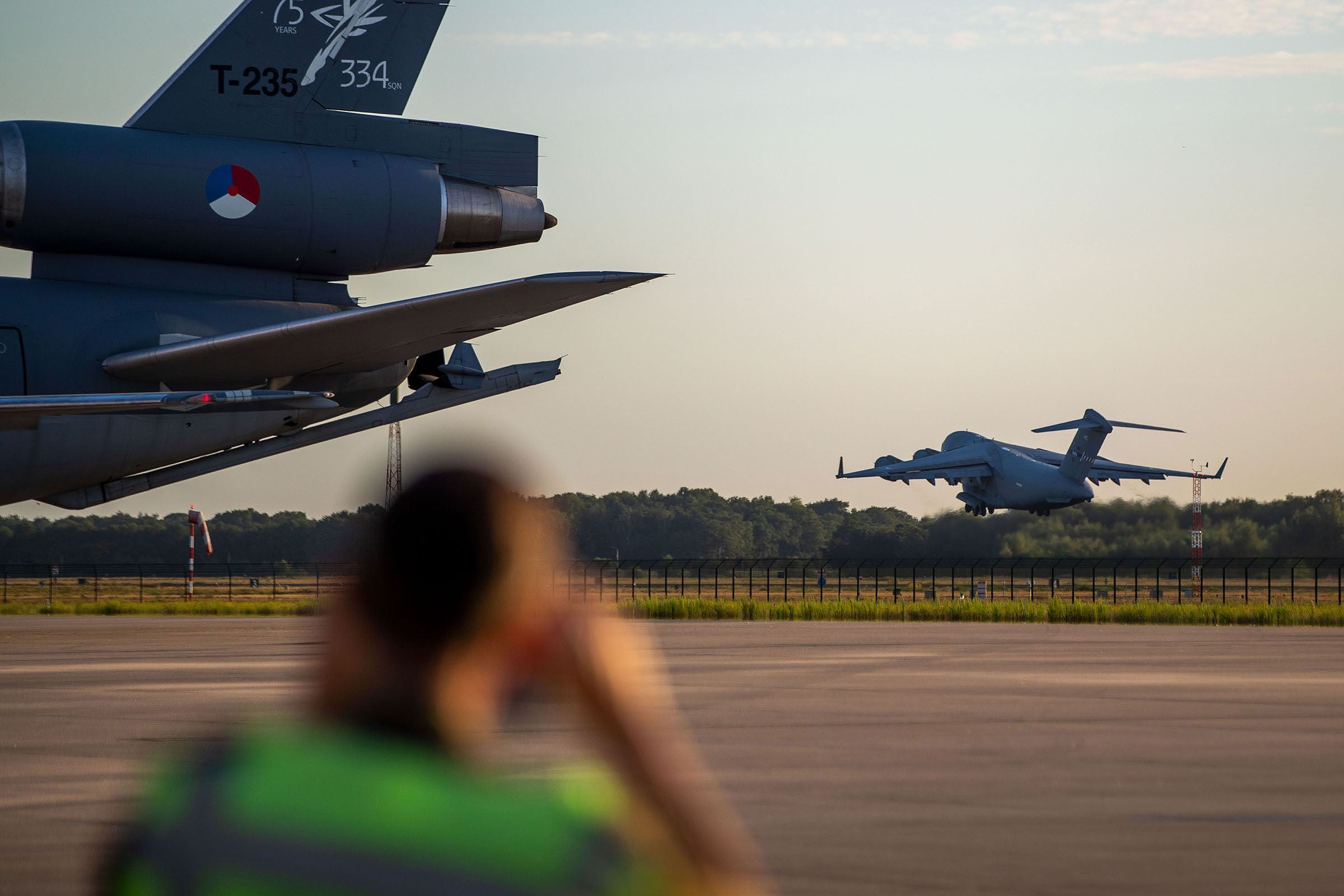 Het zogenoemd Urban Search and Rescue (USAR)-team gaat vanavond vanaf Vliegbasis Eindhoven naar Beiroet. Gisteren werd de Libanese hoofdstad getroffen door een zware explosie. Het meer dan 60 koppige zoek- en reddingsteam is gespecialiseerd in het zoeken naar vermisten en bestaat uit brandweerlieden, politie, artsen en militairen.